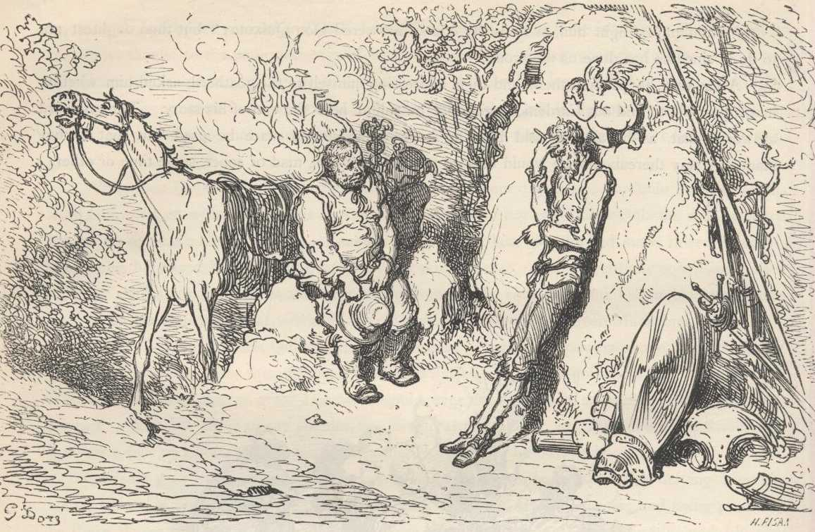 Ilustração de Gustave Doré para a edição de 1863 de "Dom Quixote" de Miguel de Cervantes